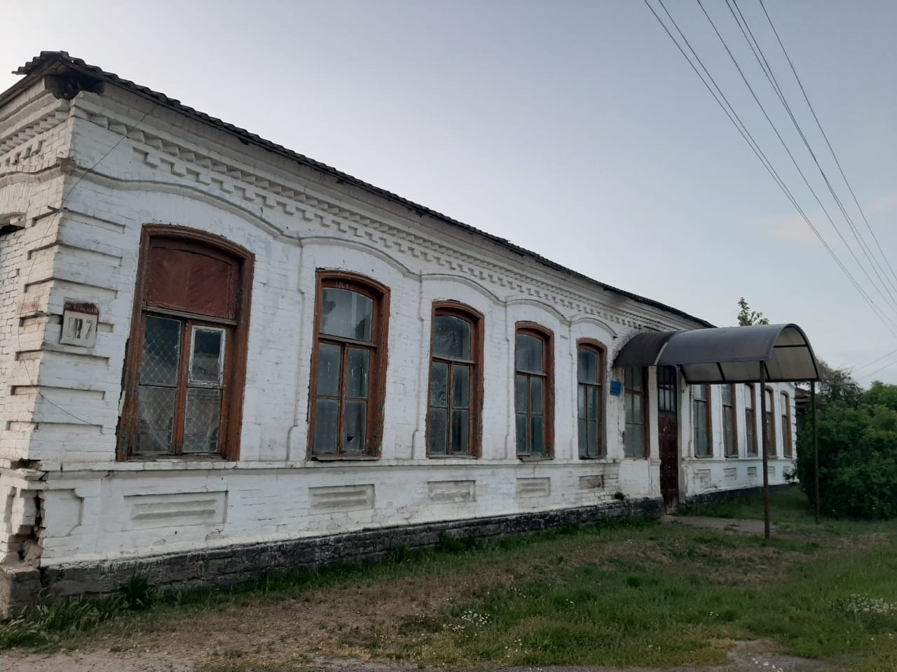 Дом братьев Мкртычевых